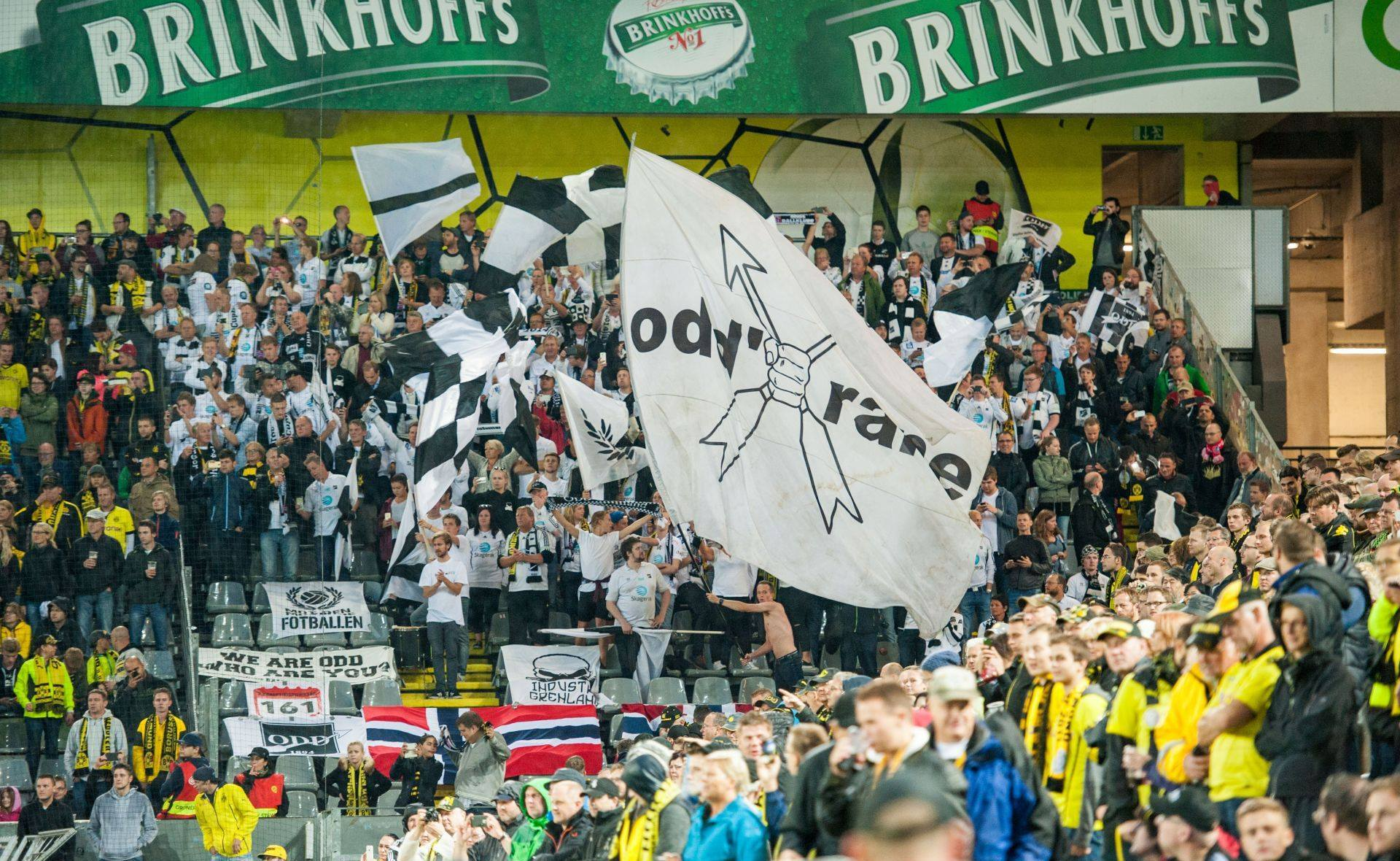 Oddrane på Signal Iduna park i europa-liga kvalifiseringen 2015